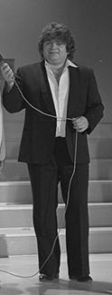 André Hazes in het Nederlandse televisieprogramma Showbizzquiz in 1981